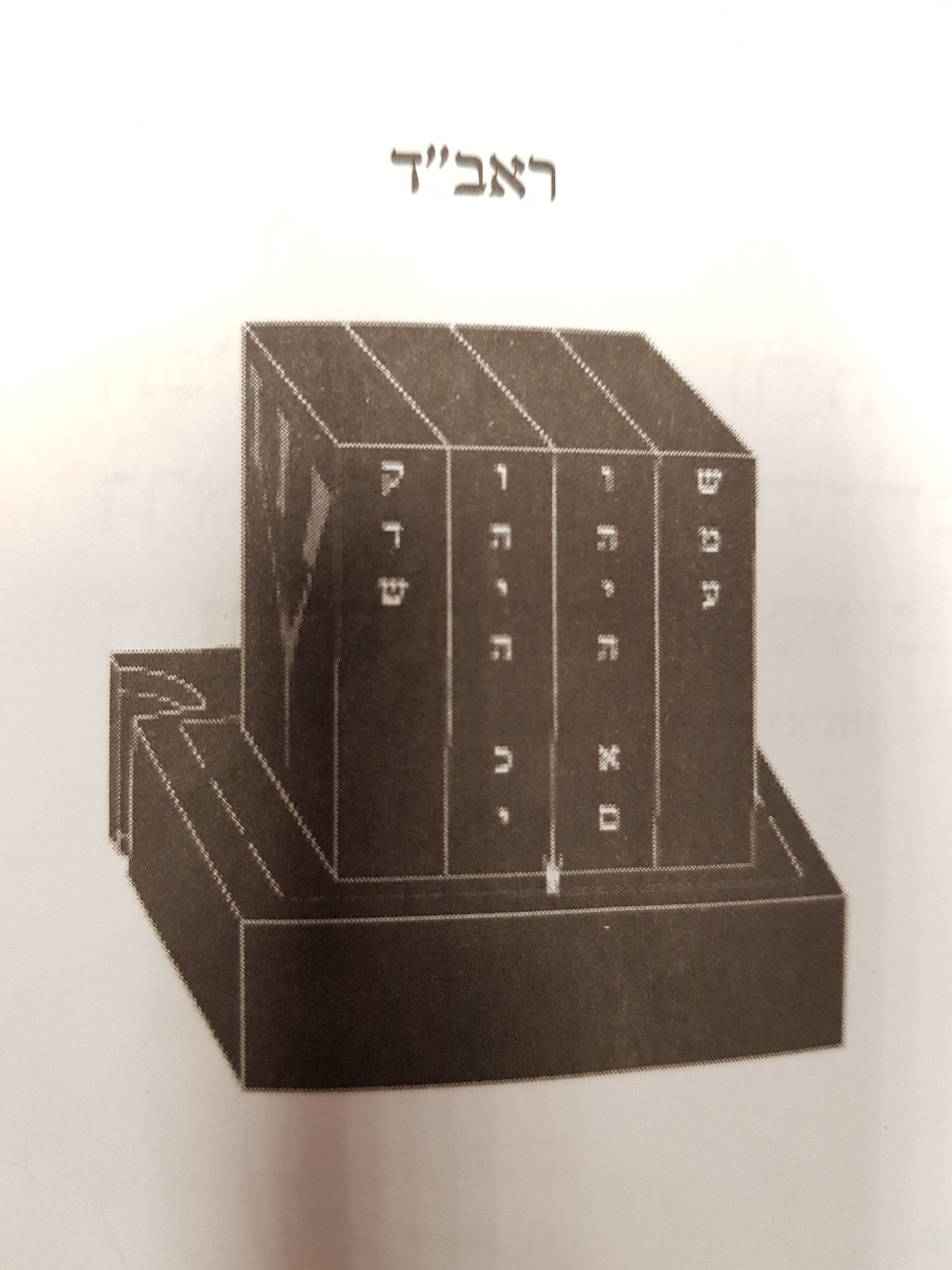 איור סדר הפרשיות לשיטת הראב"ד